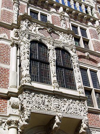 Bocholt, Nordrhein-Westfalen, Deutschland. Erker des Historischen Rathauses, fotografiert von Michael Weidemann und nach Rücksprache per E-Mail freigegeben als GNU-FDL